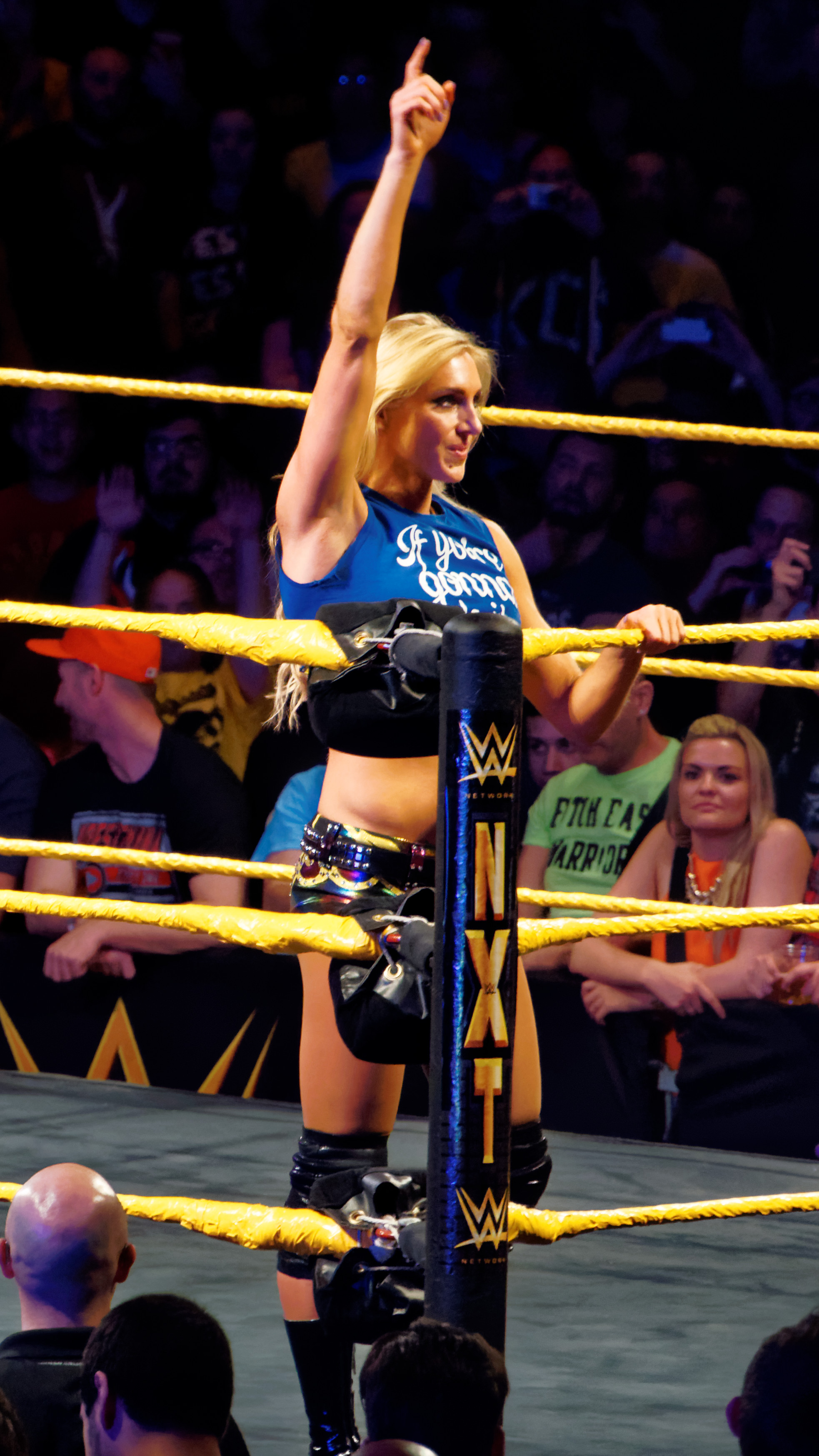 2015-03-28_00-10-07_ILCE-6000_3880_DxO